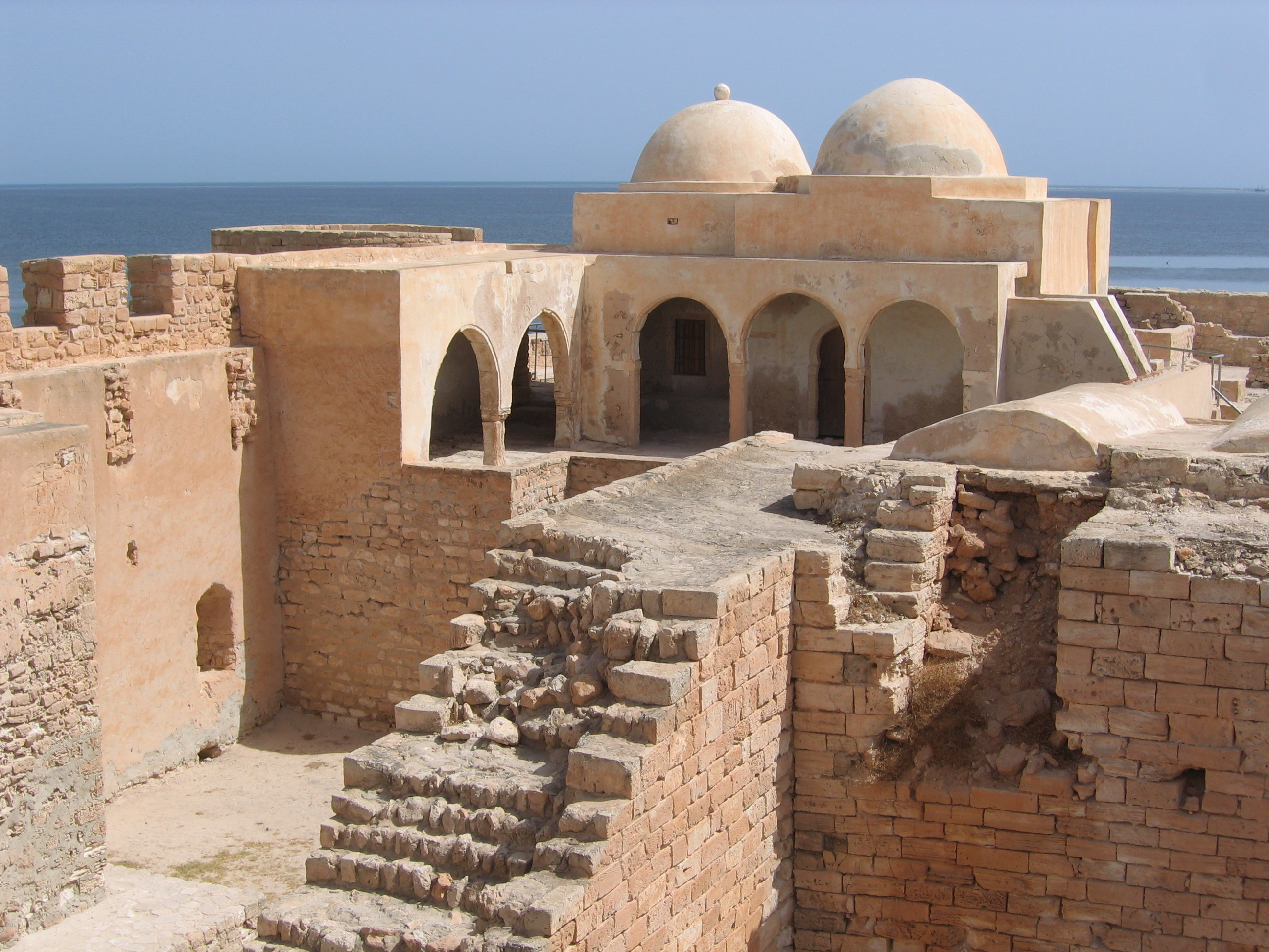 Moschee innerhalb der Festung Bordj-el-Kebir in Houmt Souk auf Djerba